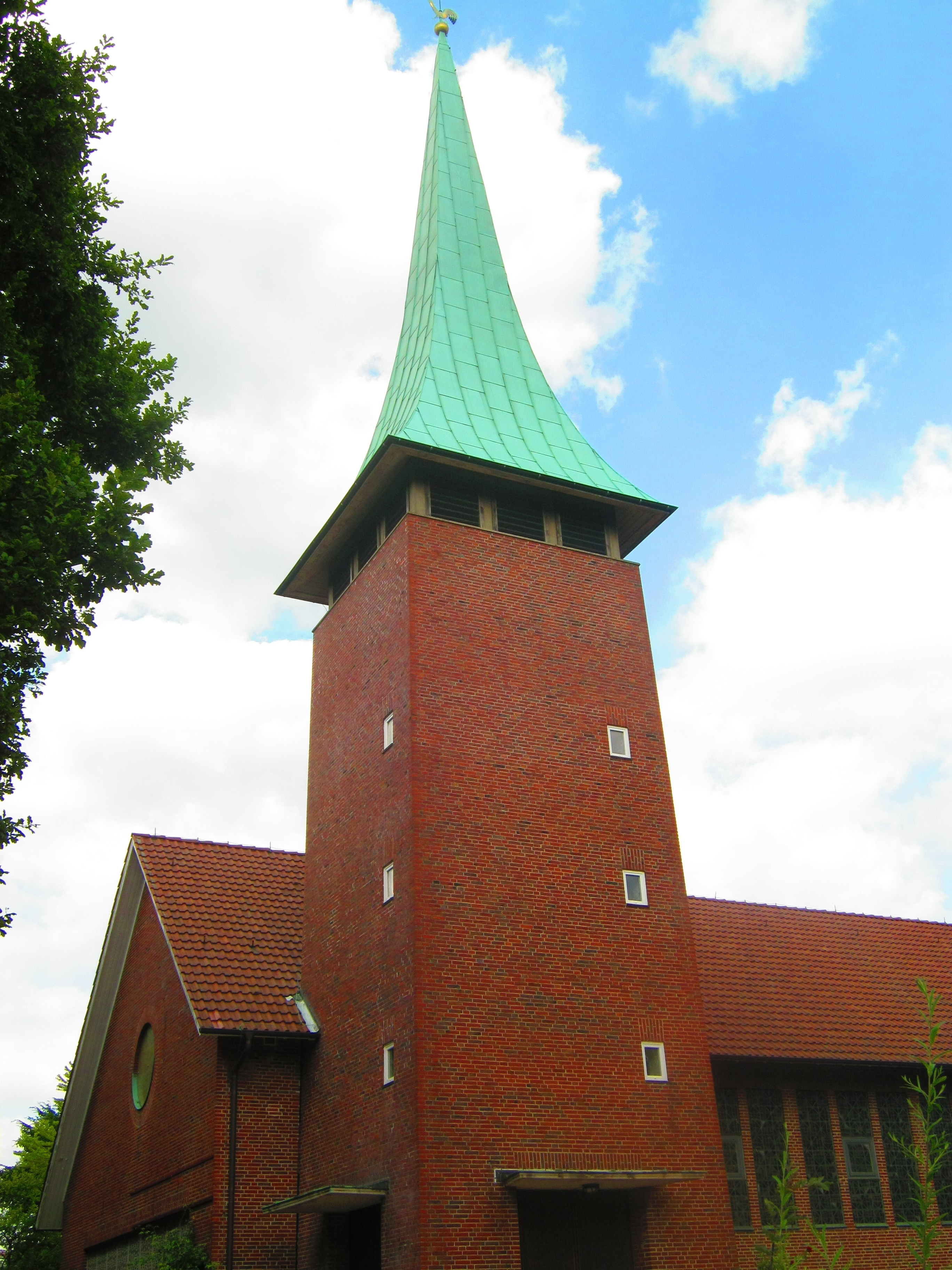 Auferstehungskirche in Hamburg-Marmstorf.